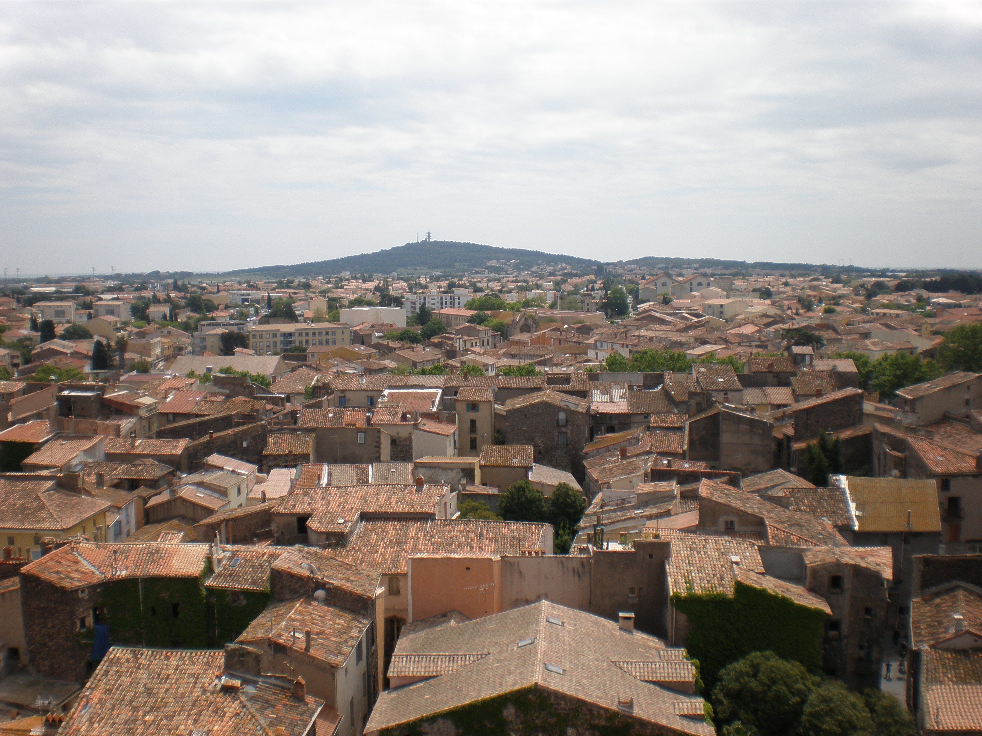 Vue du centre-ville d'Agde depuis le sommet du clocher de la cathédrale Saint-Étienne (Hérault,34)